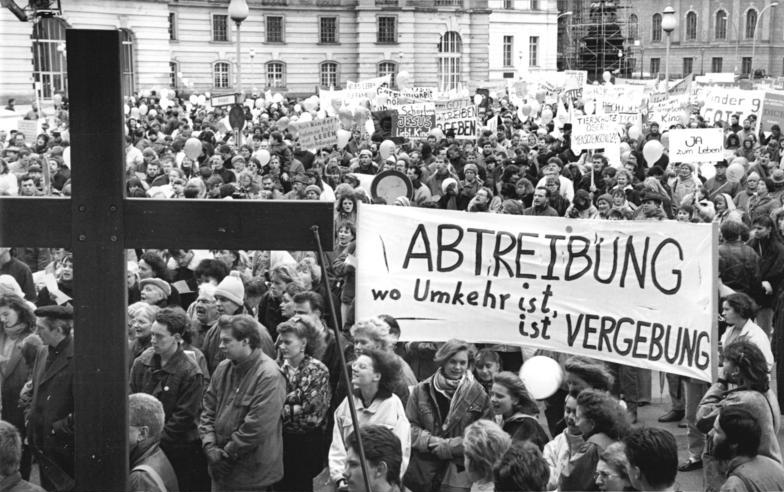 ADN- Hubert Link 21.11.90 Berlin: Zu einem Proklamationsmarsch unter dem Motto "Du sollst leben" vereinten sich zum Buß- und Bettag Christen, um zum Schutz des ungeborenen Lebens aufzurufen. Der geistliche Teil des Proklamationsmarsches wurde vor der St.-Hedwigs-Kathedrale abgehalten.